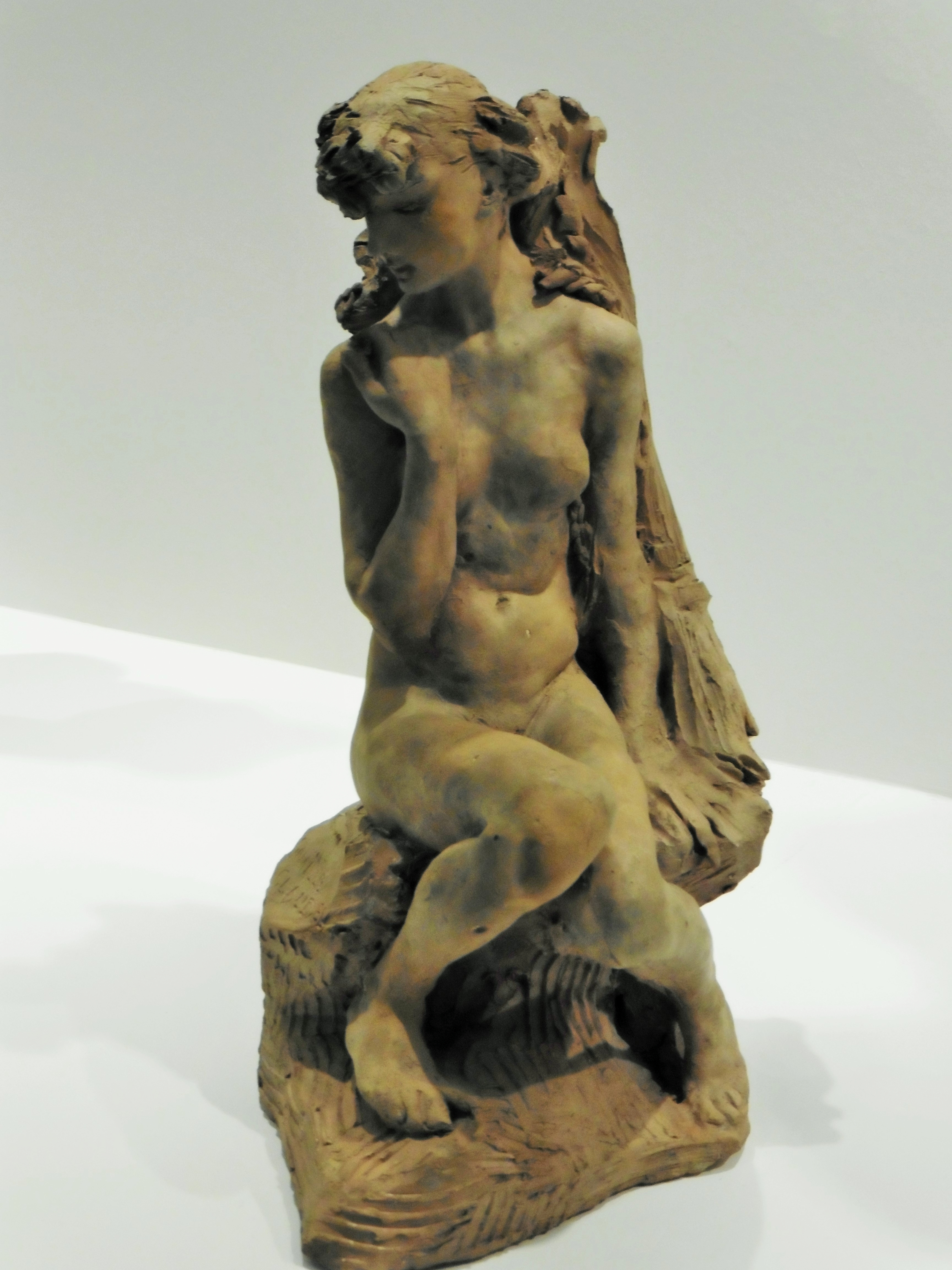 Sculptures de Camille Claudel, Jeune fille à la gerbe, 1886, terre cuite "Au miroir d'un art nouveau" au Musée d'Art et d'Industrie de Roubaix dit "la Piscine", Roubaix, France. Camille Claudel (1864–1943) DescriptionFrench sculptor and graphic designerDate of birth/death 8 December 1864 19 October 1943Location of birth/death Fère-en-Tardenois AvignonWork location Paris (1883)Authority control : Q120582 VIAF: 66585142 ISNI: 0000 0001 2137 4309 ULAN: 500102192 LCCN: n82158800 WGA: CLAUDEL, Camille WorldCat creator QS:P170,Q120582